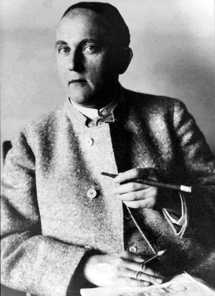 Wenzel Hablik (1881-1934), Malíř, grafik a architekt.